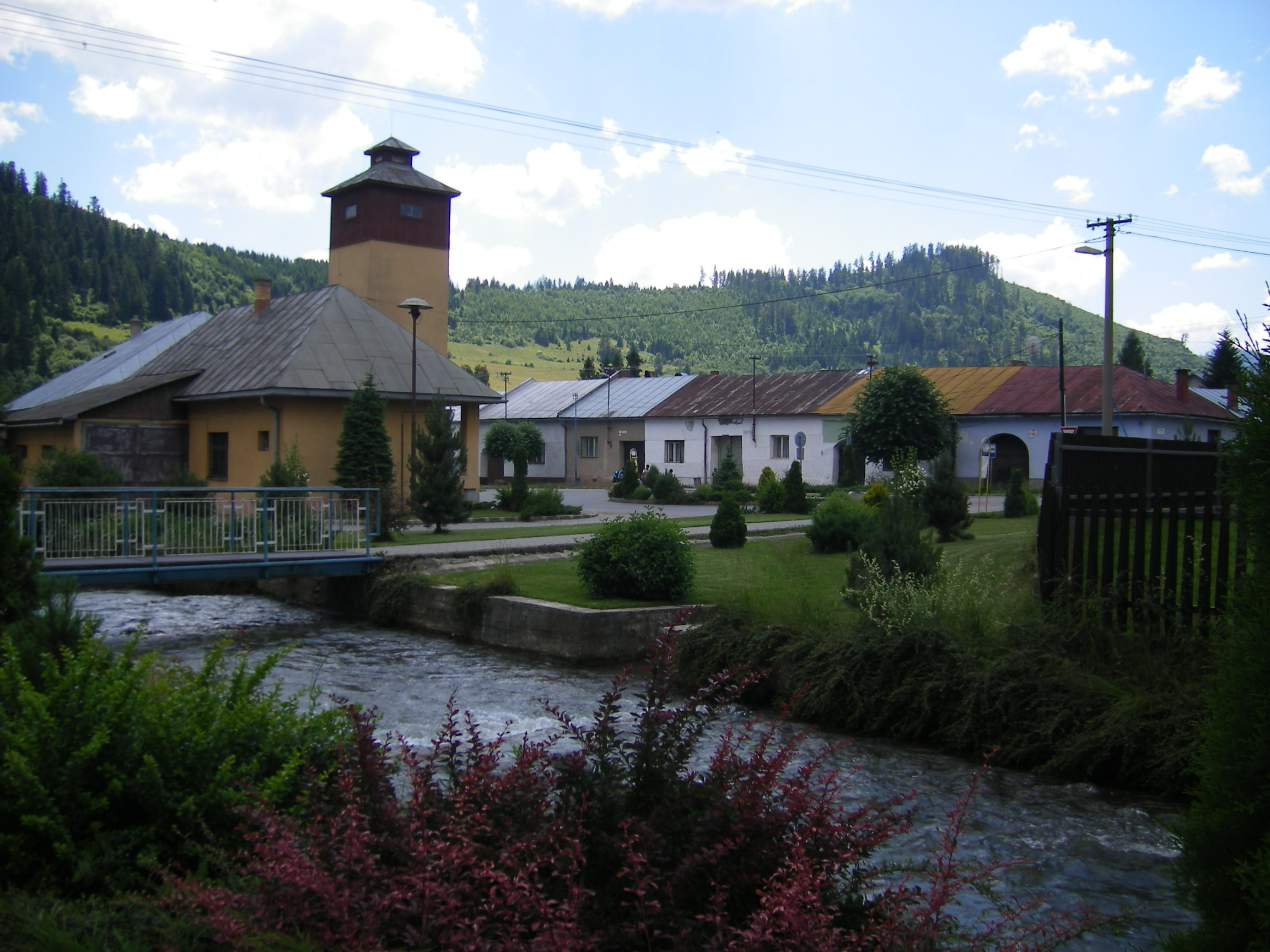 Nálepkovo (GL), Železný potok